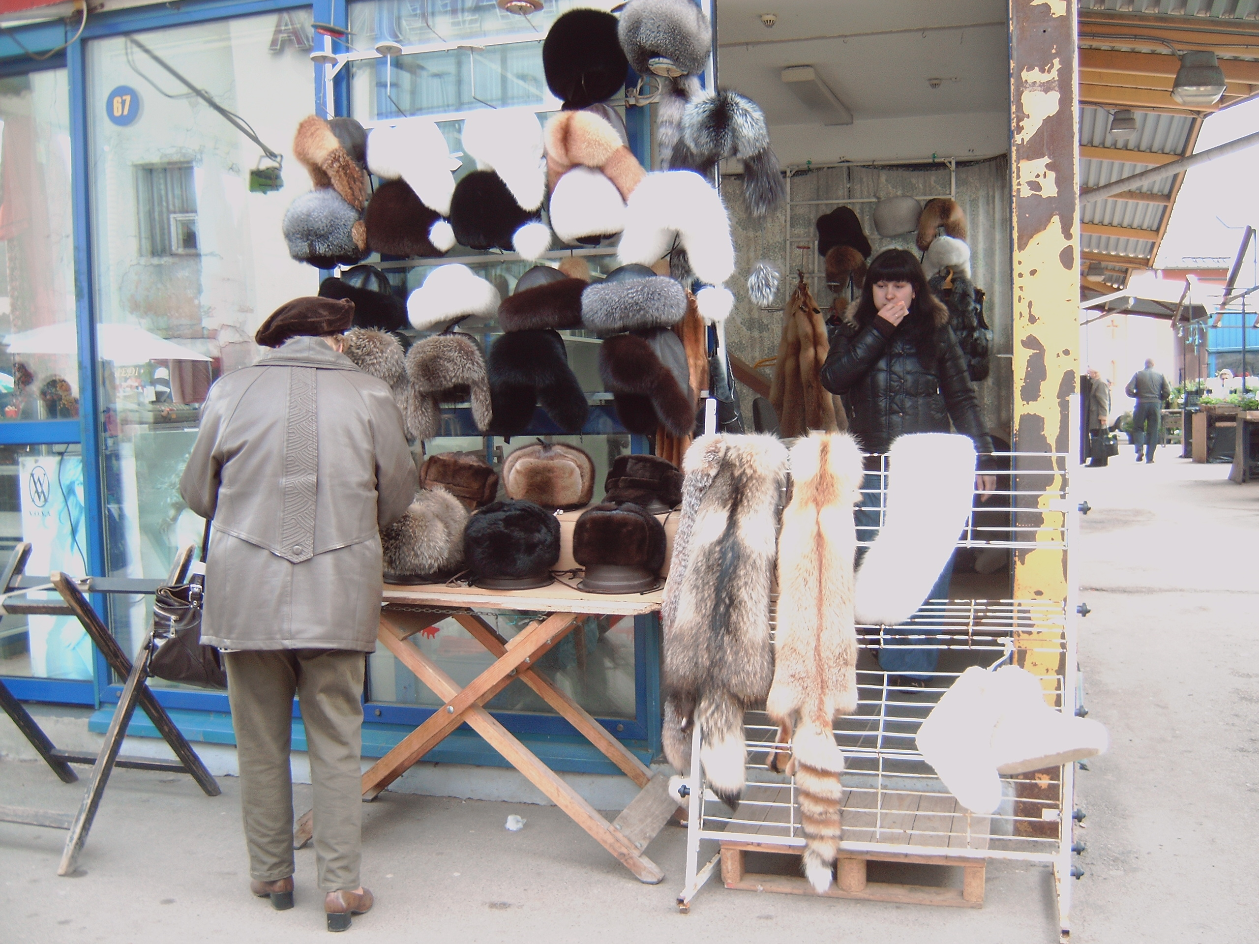 Marchand de fourrure au Marché central de Riga.